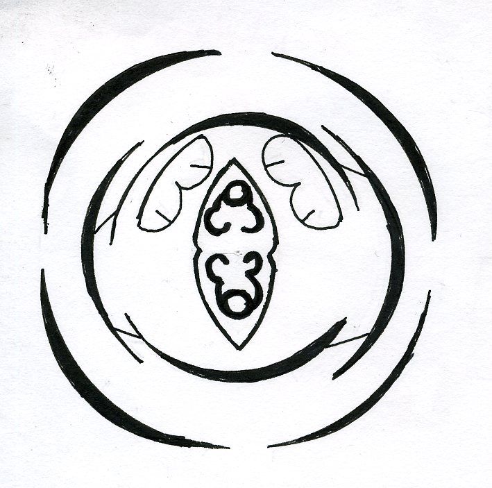 bloemdiagram Grote ereprijs (Veronica persica), Veronica floral diagram